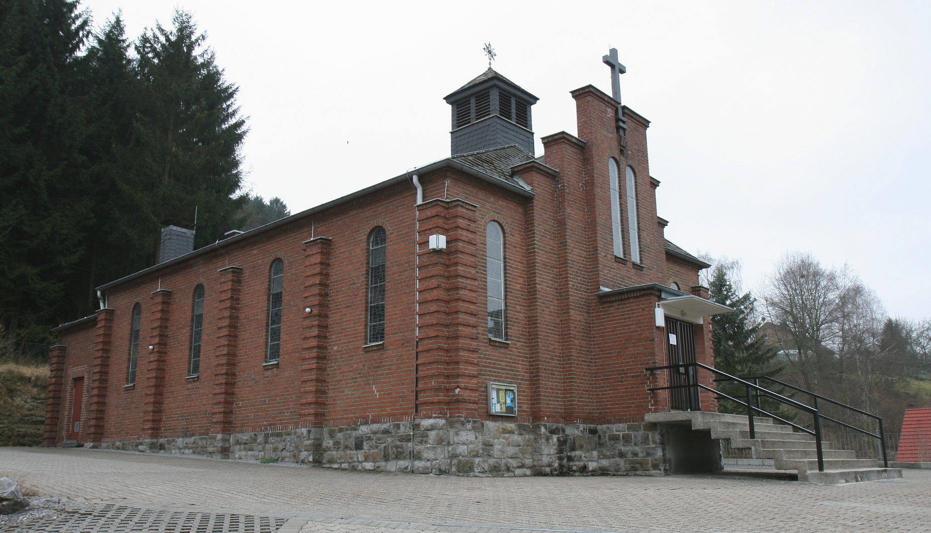 Katholische Kirche St. Marien in Hemer-Bredenbruch.